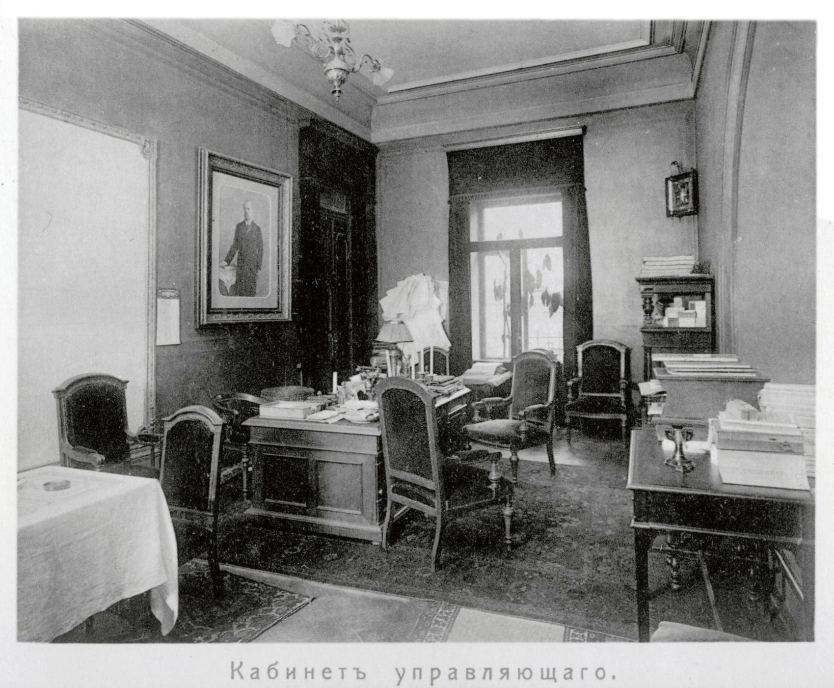 Магазин Елисеева и погреба русских и иностранных вин. Кабинет управляющего